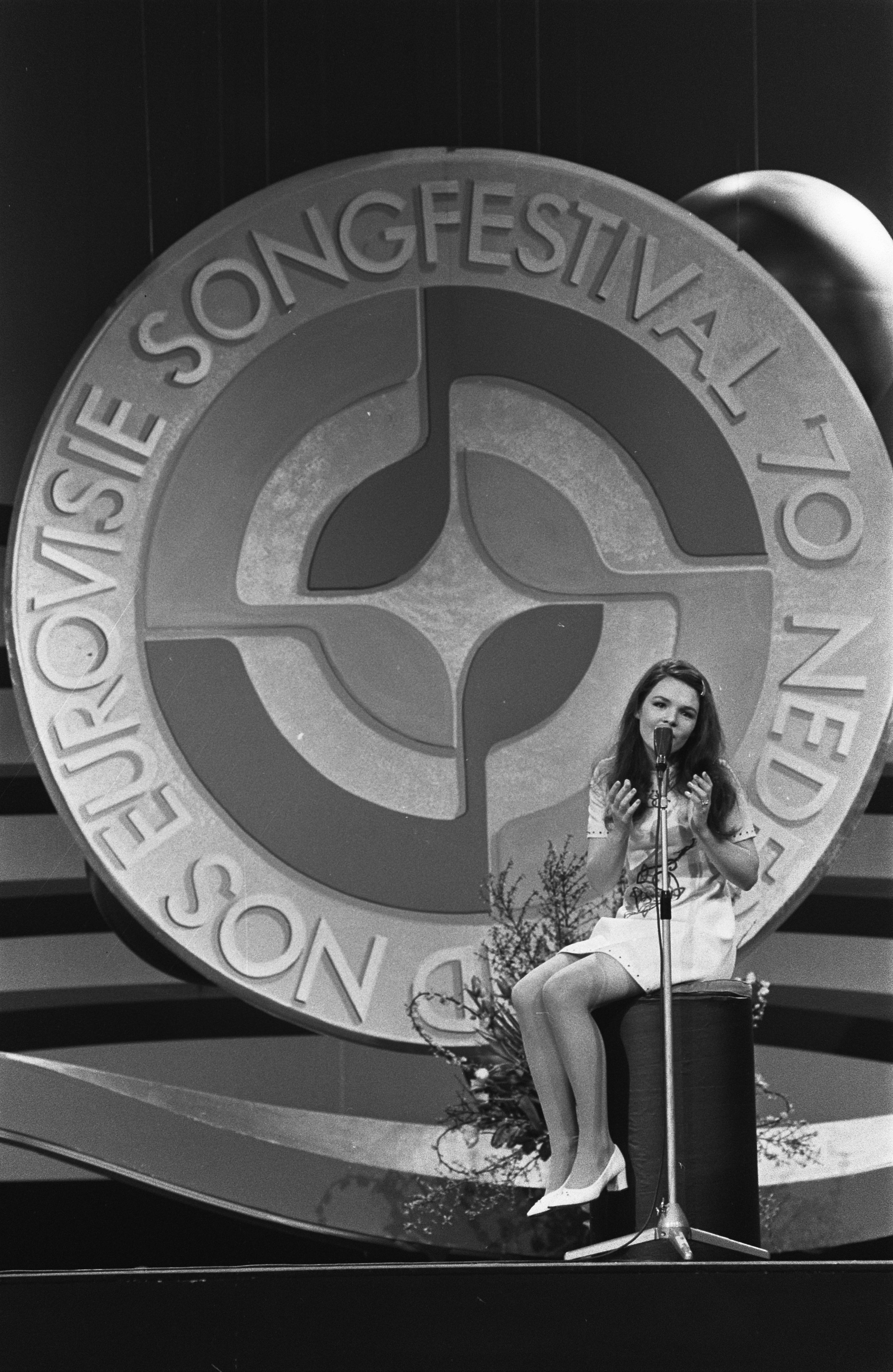 Collectie / Archief : Fotocollectie Anefo Reportage / Serie : Eurovisie Songfestival 1970 in RAI te Amsterdam Beschrijving : Dana (Ierland) Annotatie : De uiteindelijke winnares. Volledige naam: Dana Rosemary Scallon Datum : 21 maart 1970 Locatie : Amsterdam, Noord-Holland Trefwoorden : artiesten, songfestivals, zangers Persoonsnaam : Dana (zangeres) Instellingsnaam : Eurovisie Song Festival Fotograaf : Koch, Eric / Anefo Auteursrechthebbende : Nationaal Archief Materiaalsoort : Negatief (zwart/wit) Nummer archiefinventaris : bekijk toegang 2.24.01.05 Bestanddeelnummer : 923-3693 Reacties Geplaatst door Musiclady op 28 juli 2016 - 10:00. (Ierland) Dana zingt het - winnende - liedje 'All Kinds of Everything'. NB. geboren als Rosemary Brown, vooral bekend onder haar artiestennaam Dana.